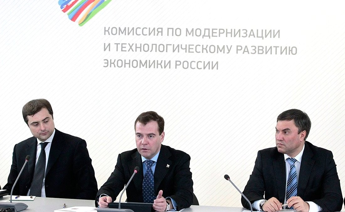 Дмитрий Медведев на заседании Комиссии по модернизации и технологическому развитию экономики России 28 февраля 2011 года